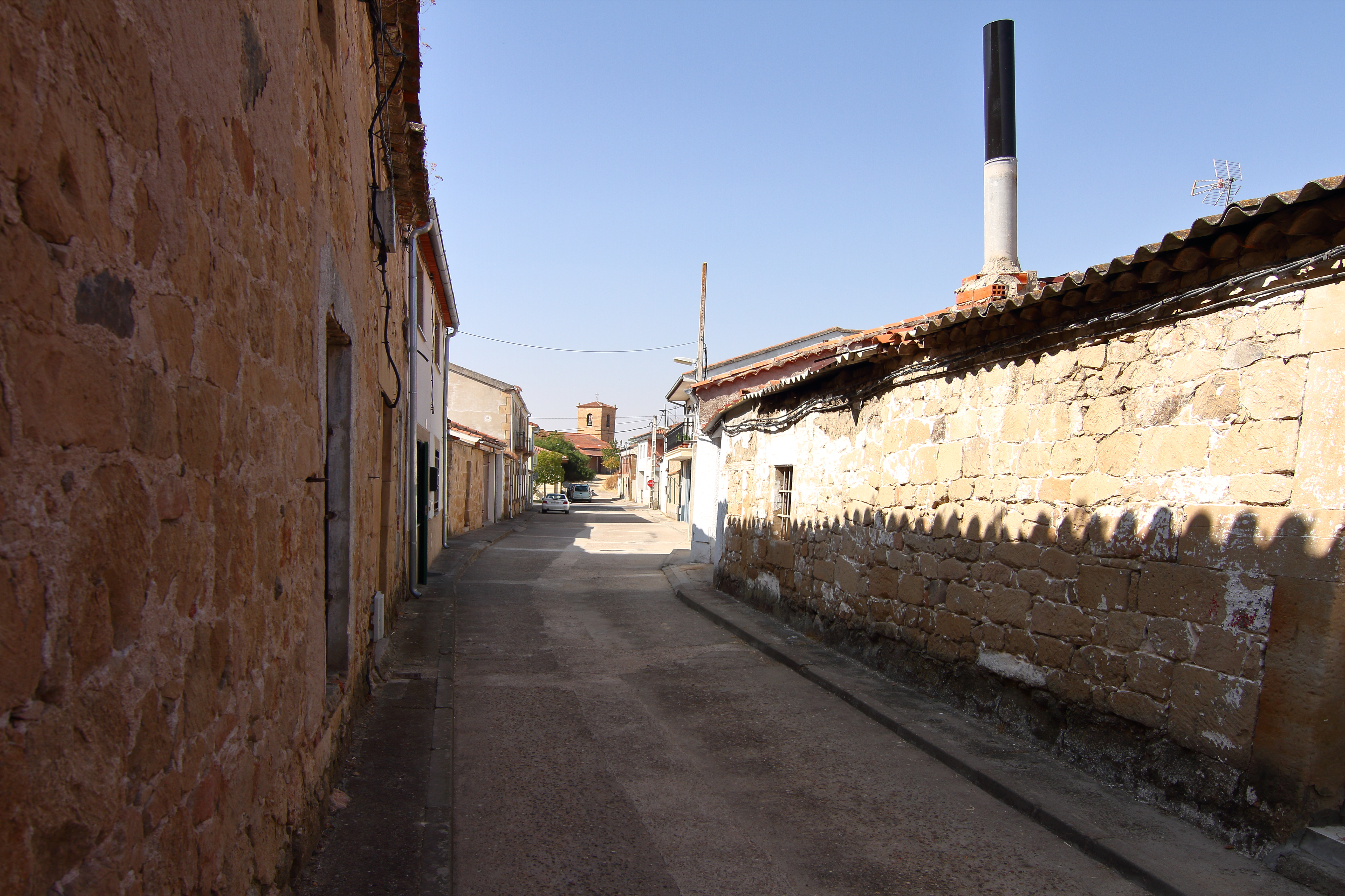 Pedrosillo el Ralo, calle Iglesia